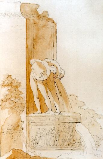 Proyecto de fuente monumental, Museo de Bellas Artes de Córdoba (CE0927D)